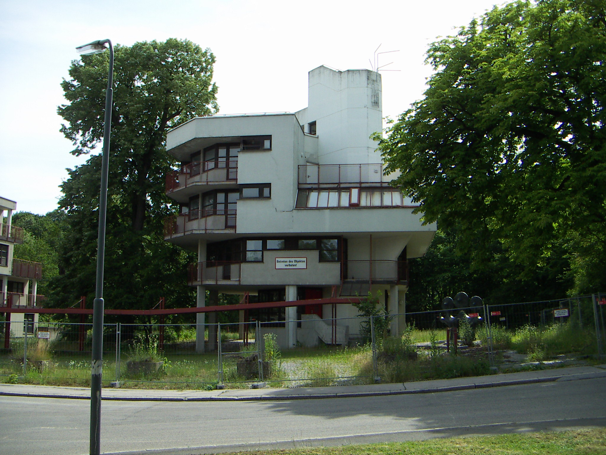 Stadt des Kindes, Wien Penzing, Architekt Anton Schweighofer, Sozialpädagogisches Konzept: Maria Jacobi, Gesiba 1969-1974, Bauherr: Kuratorium für Wiener Jugendheime